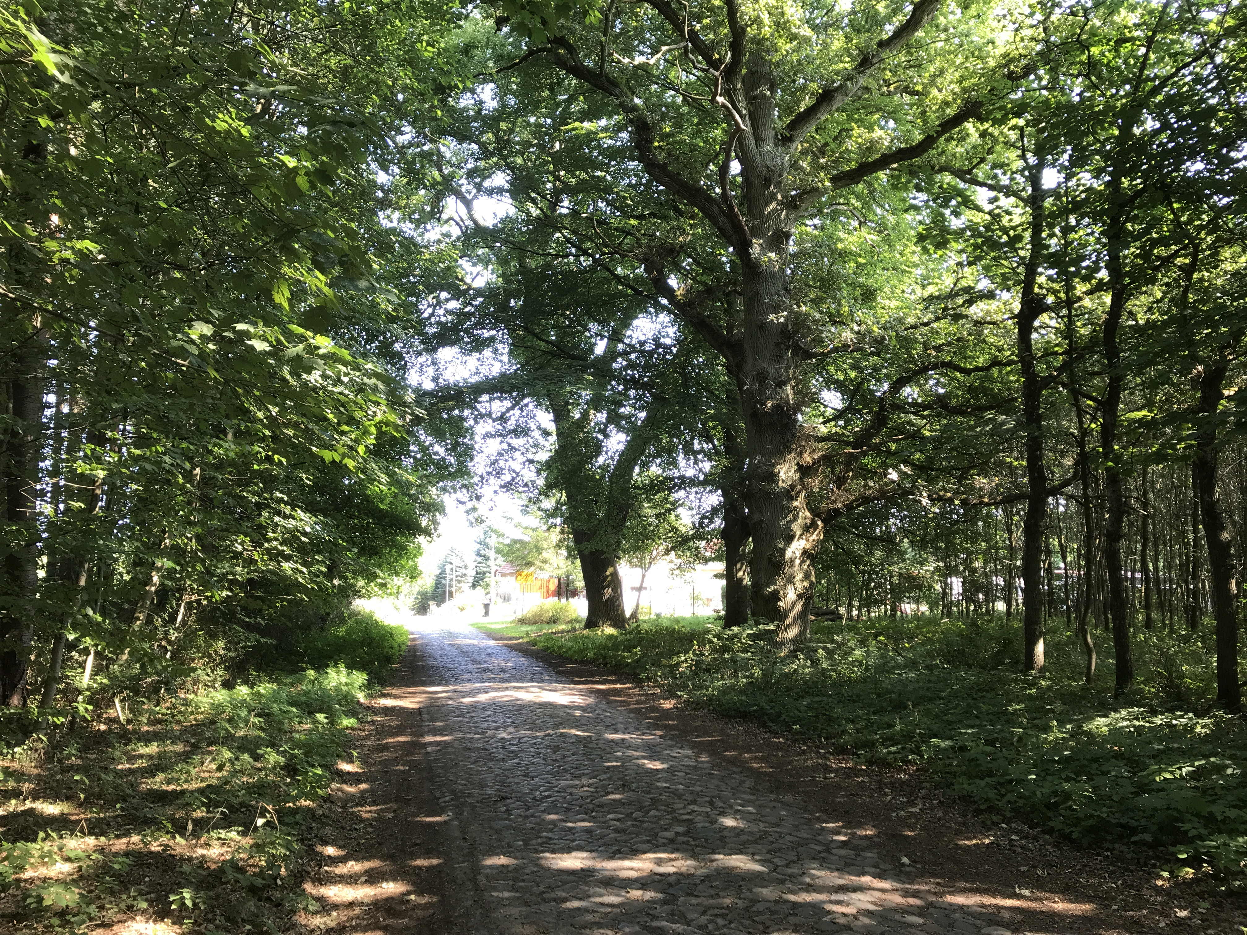 südlicher Ortsteingang von Jägerhof, ein Ortsteil der Gemeinde Katzow in Mecklenburg-Vorpommern